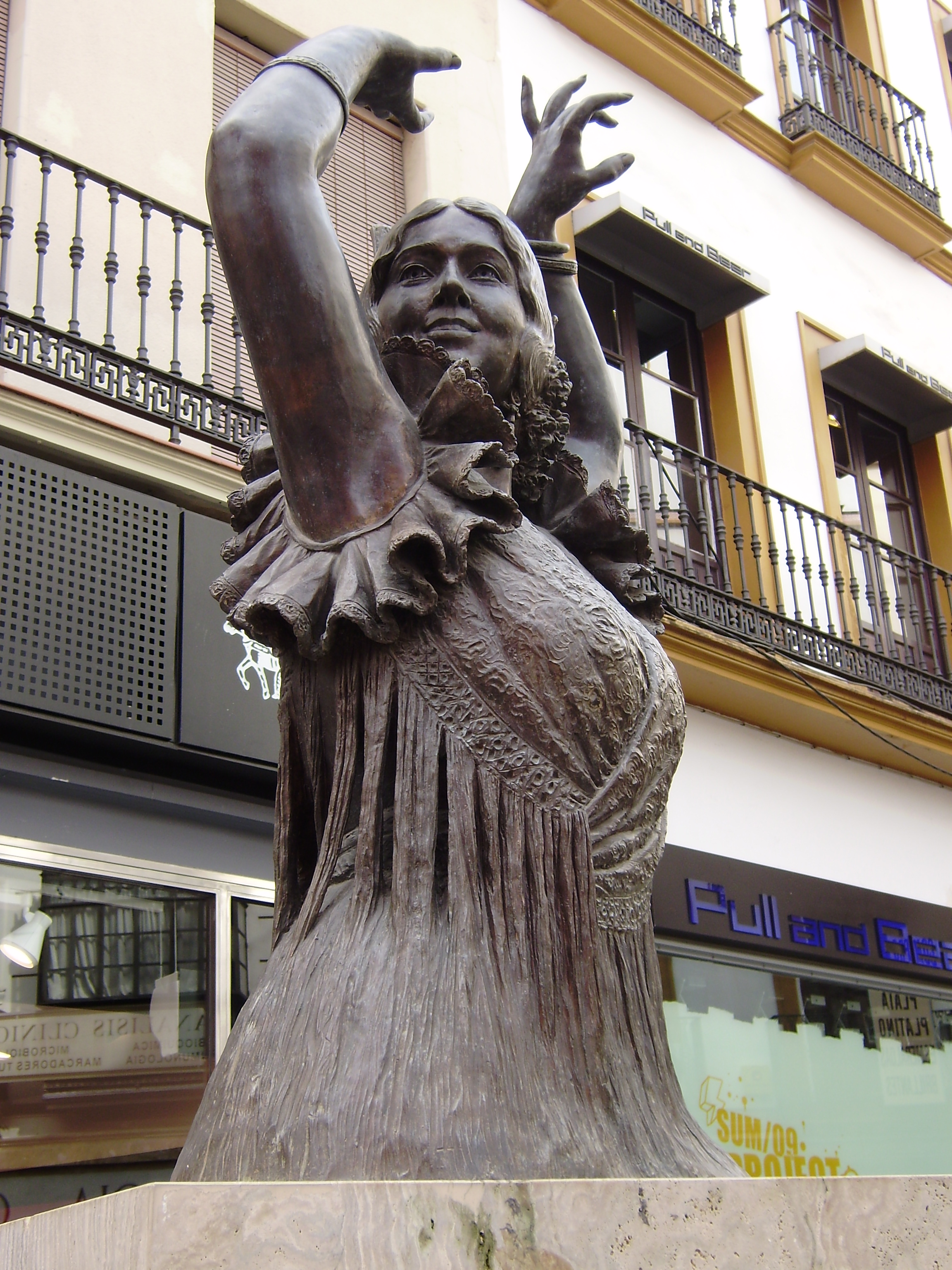 Estatua dedicada a Pastora Imperio situada en el cruce de las calles O´Donnell y Velázquez en la ciudad de Sevilla (España)